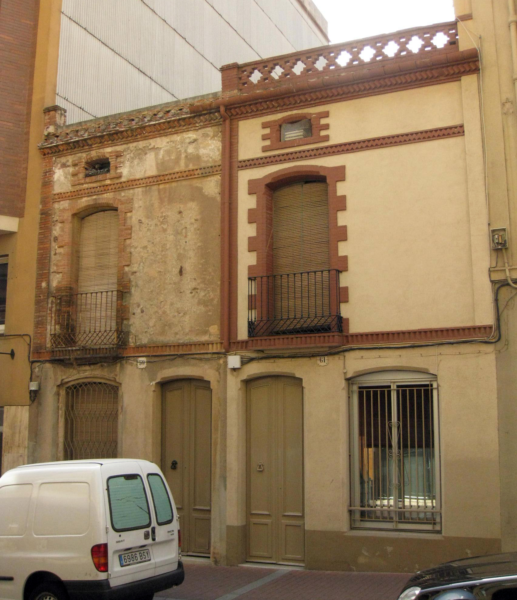 Cases Pere Comerma I, al carrer del Nord núm. 59-61 (Terrassa).